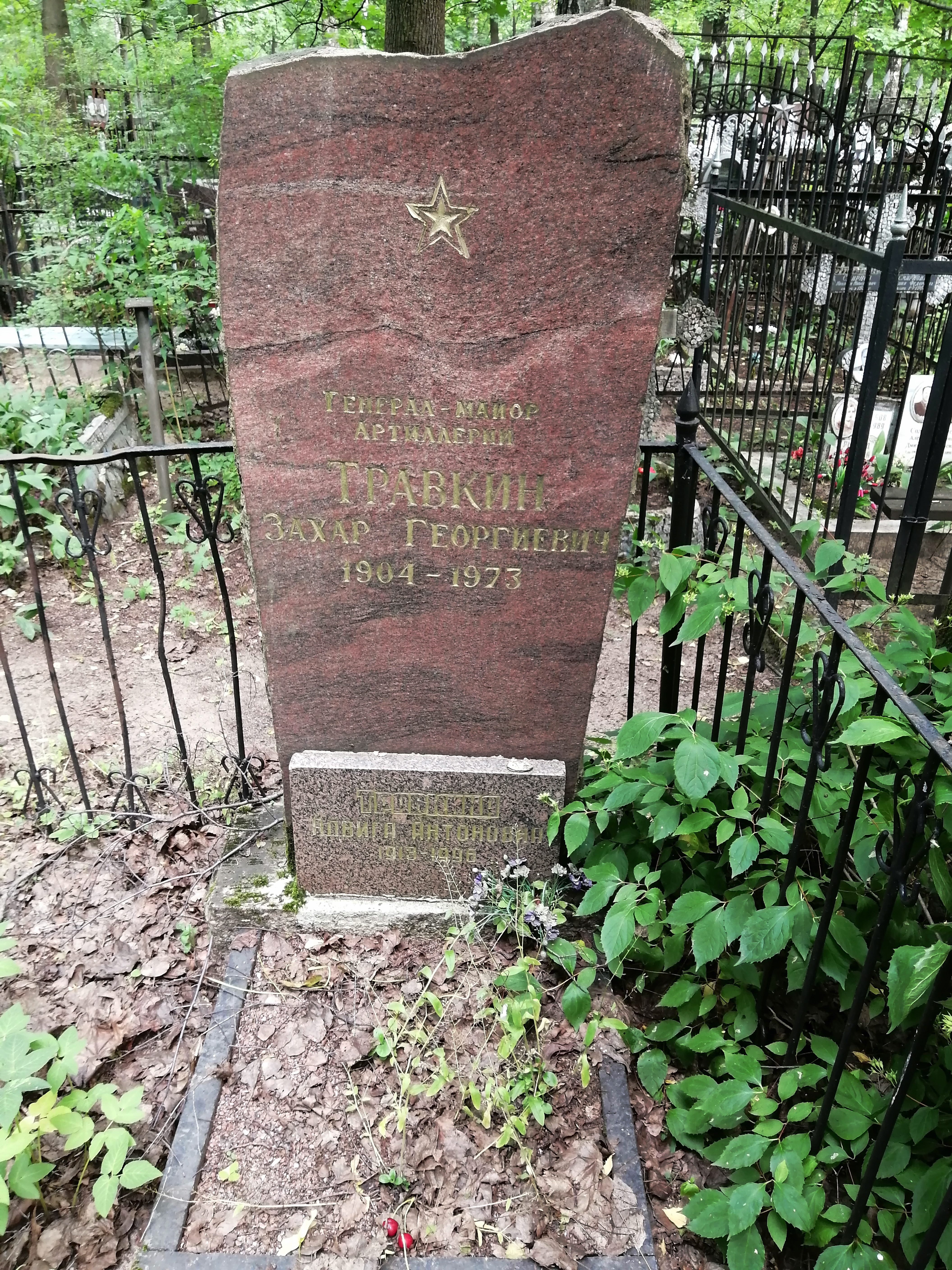 Могила Травкина З.Г. Богословское кладбище, Санкт-Петербург